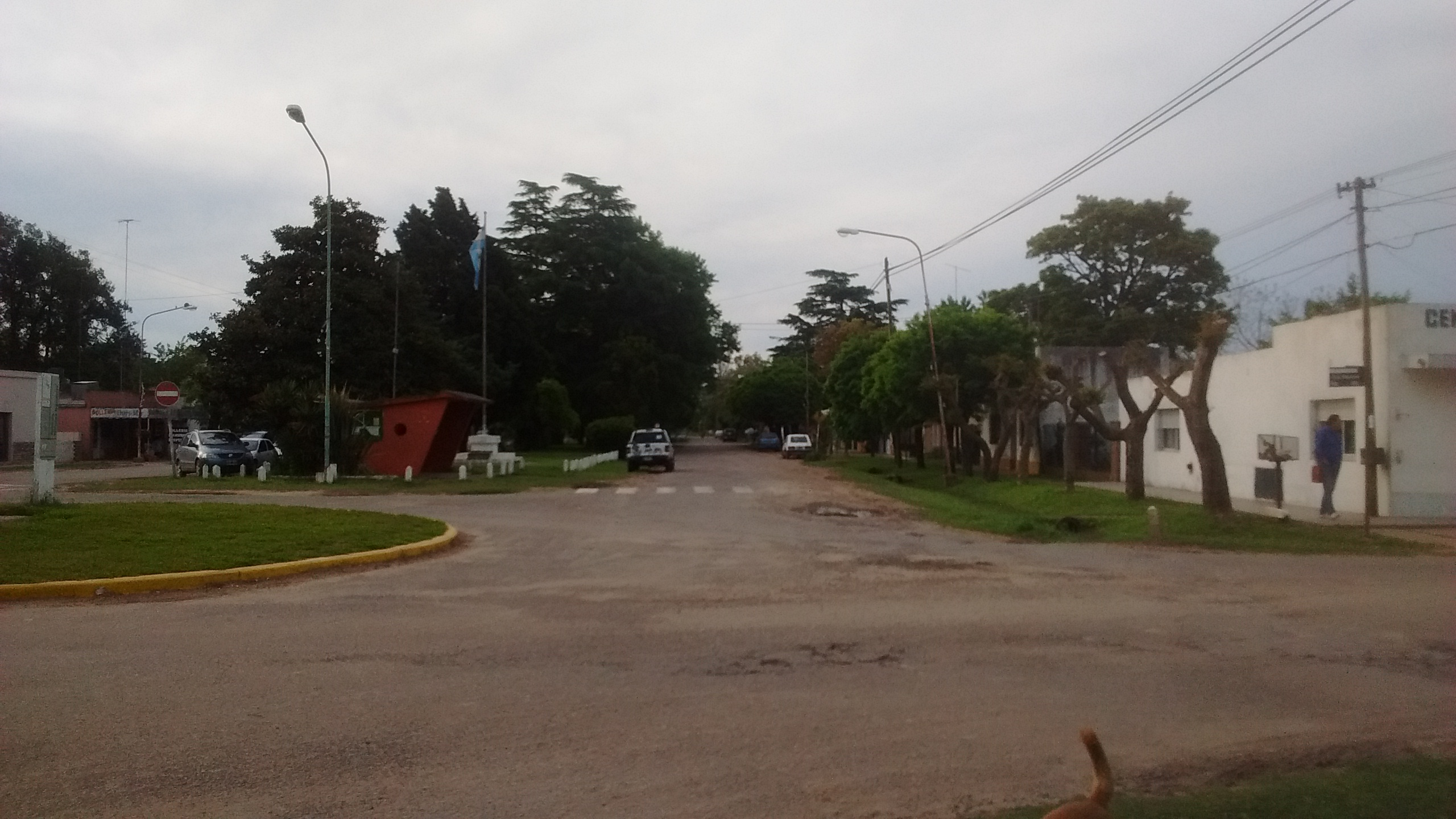 Cortines o Cortinez en el partido de Luján, provincia de Buenos Aires, Argentina.